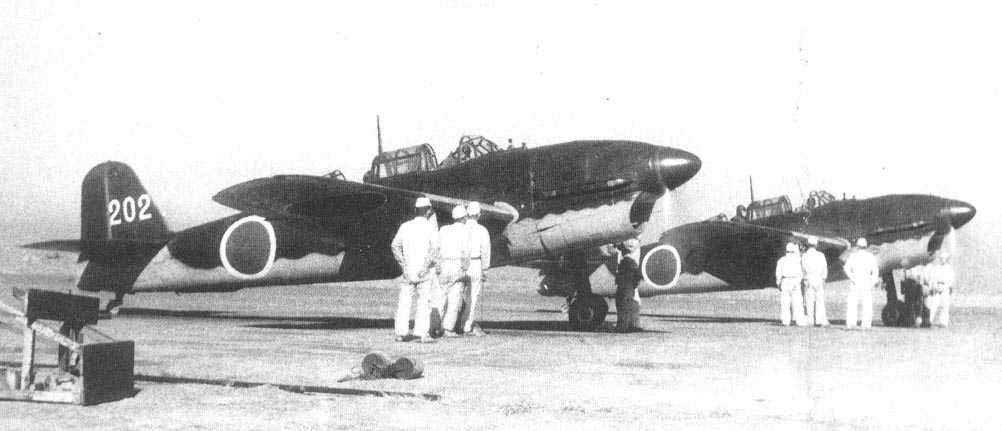 Yokosuka D4Y2 "Suisei" before taking off.